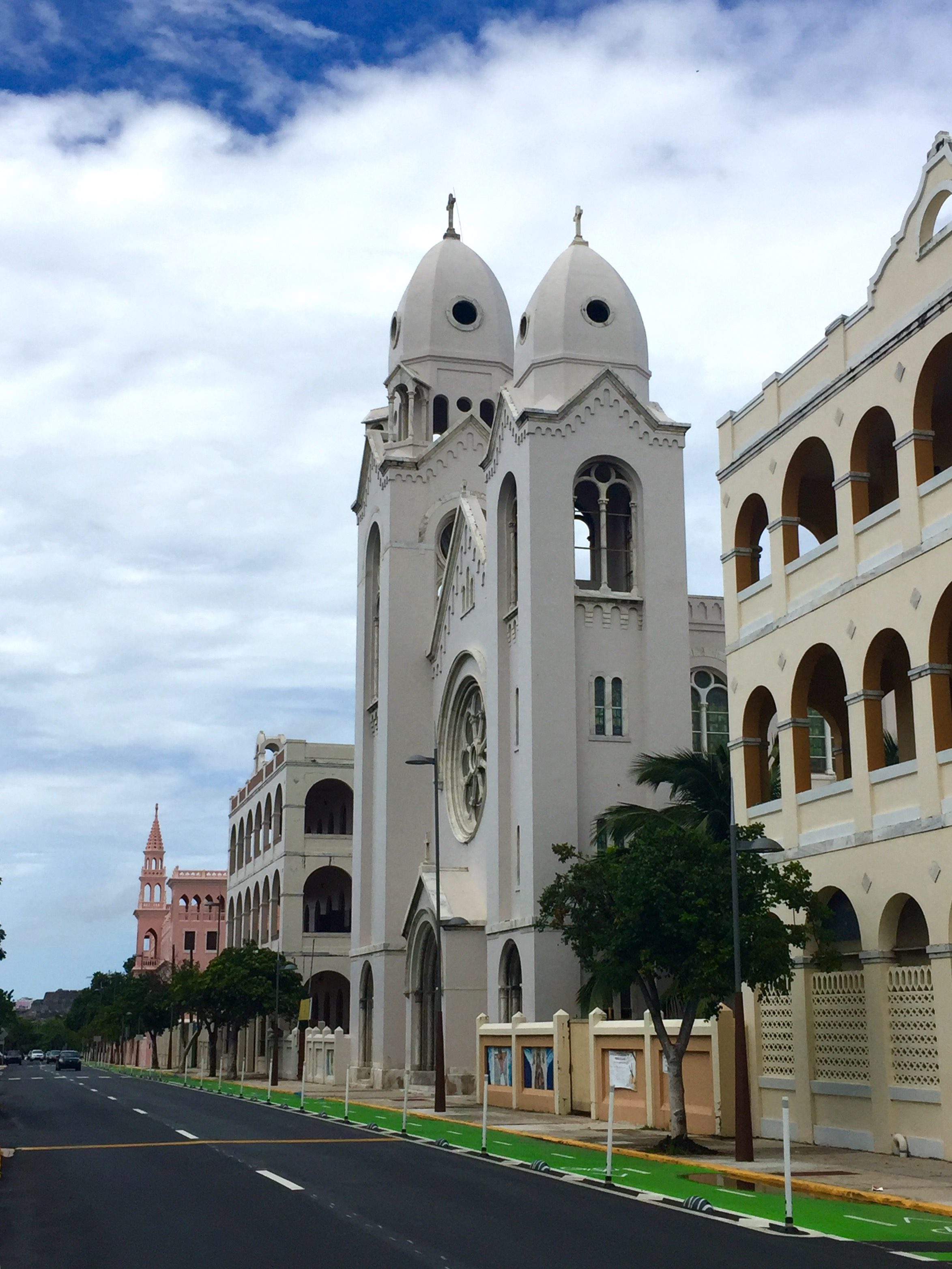 Avenida Juan Ponce de León mirando hacia San Juan Antiguo